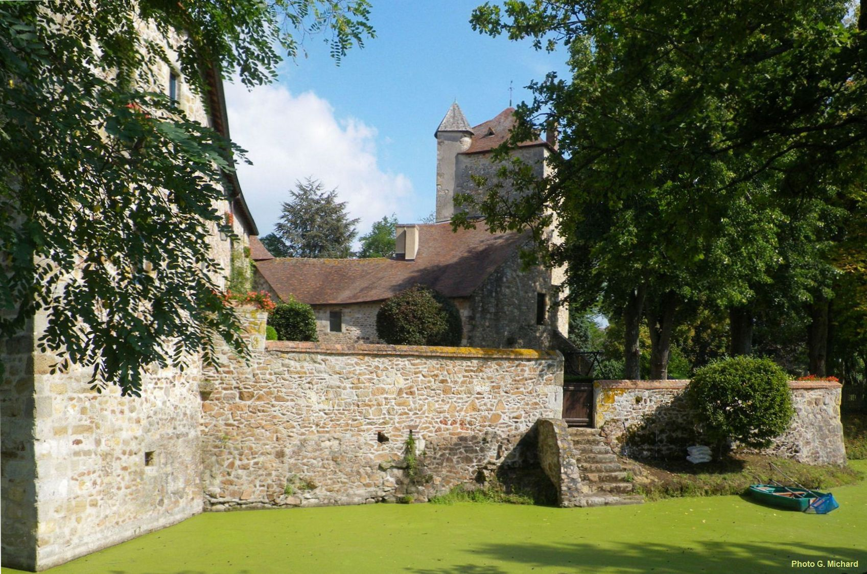 vue du château de Bord à Doyet (Allier) - photo prise en 2014